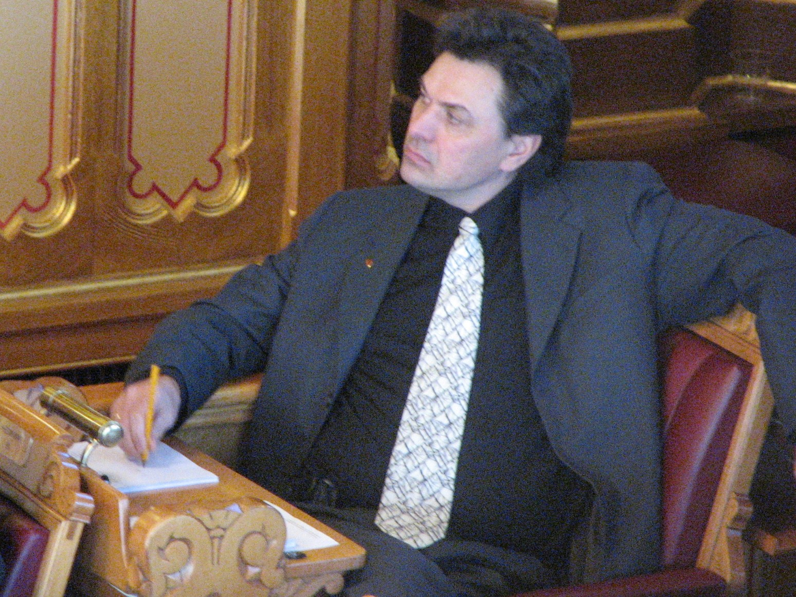 Olav Akselsen (Ap, Hordaland) i Stortinget 12. februar 2009. Beskjært fra et større bilde.